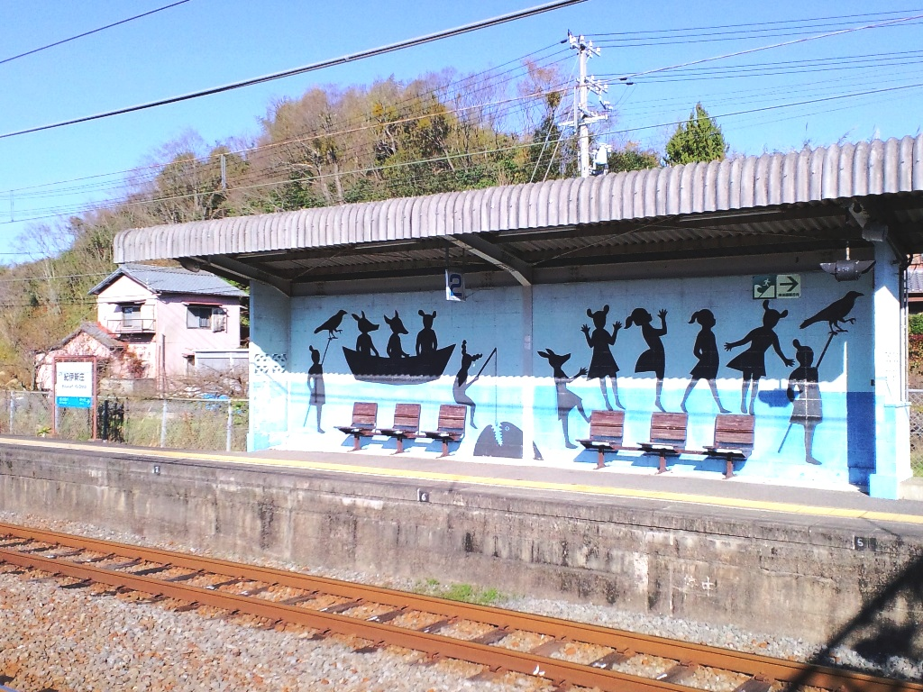 JR西日本・紀伊新庄駅 白浜・新宮方面ホーム（2016/12/31）